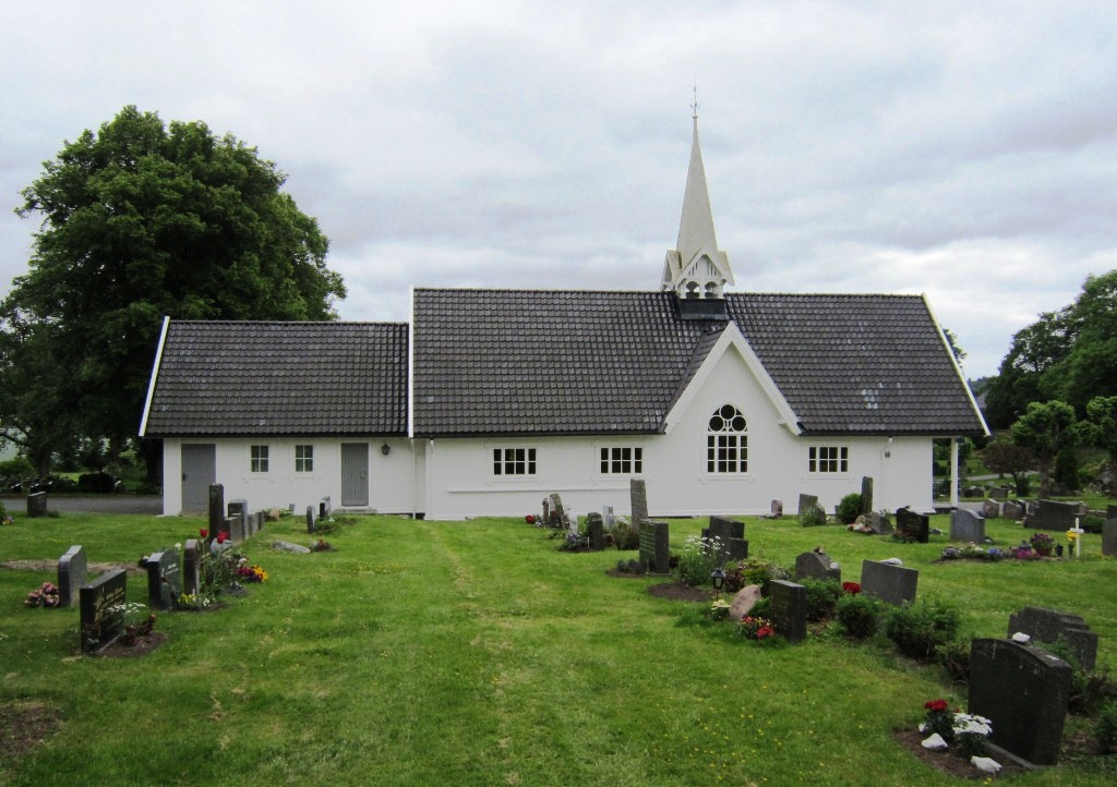 Nybo kapell, Sandefjord